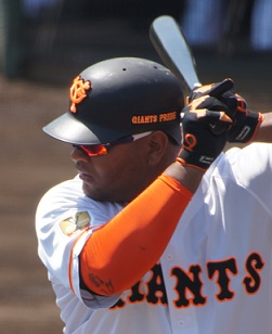 Giants_フランシスコ